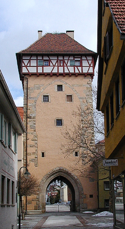 Bilder aus Reutlingen, Gartentor